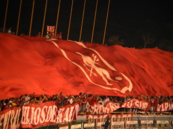 Tapatribuna del Baron Rojo Sur